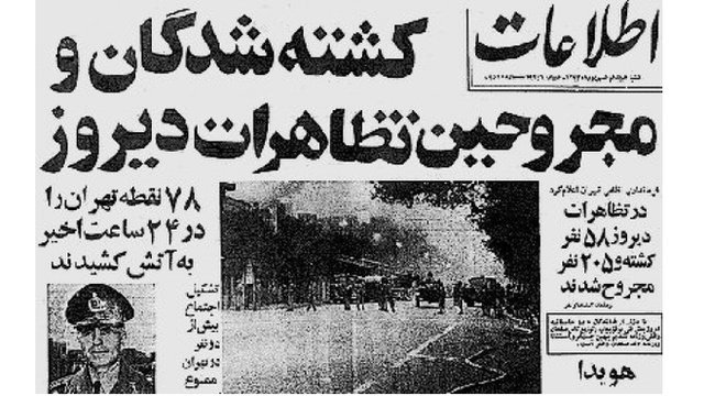 تیتر صفحه نخست در 18 شهریور 1357